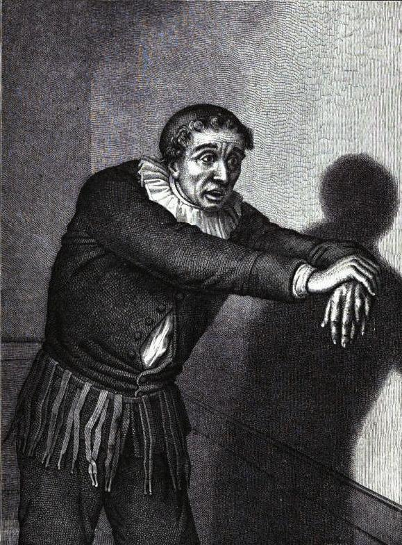 Grandménil dans le rôle d'Harpagon, tableau du foyer de la Comédie française., dessin d'Eustache Lorsay.